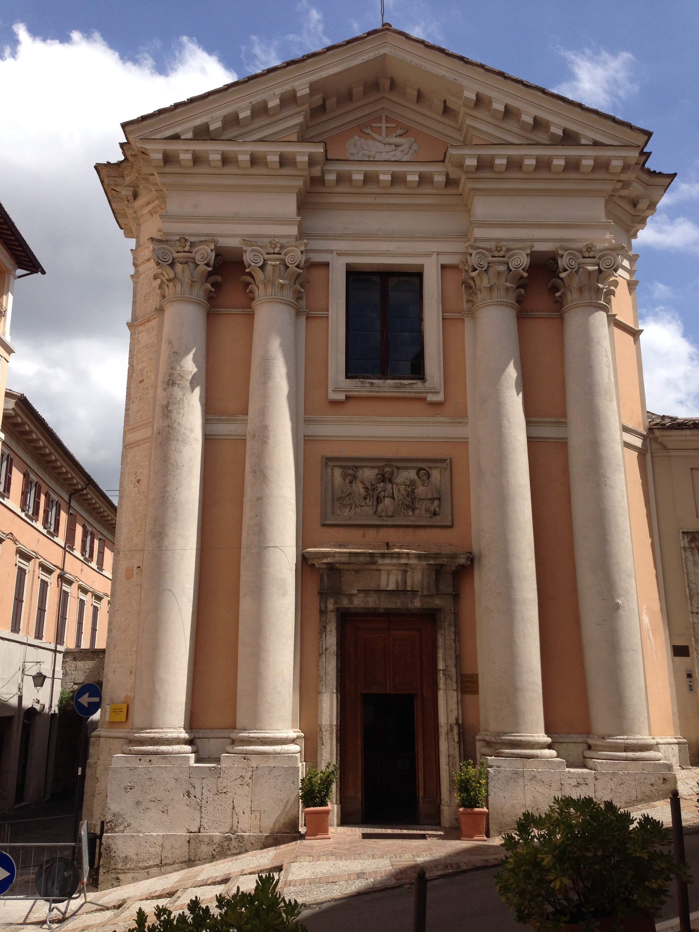 Chiesa di Sant'Ansano. Spoleto